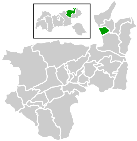 Lage der Gemeinde innerhalb des Bezirks Kufstein